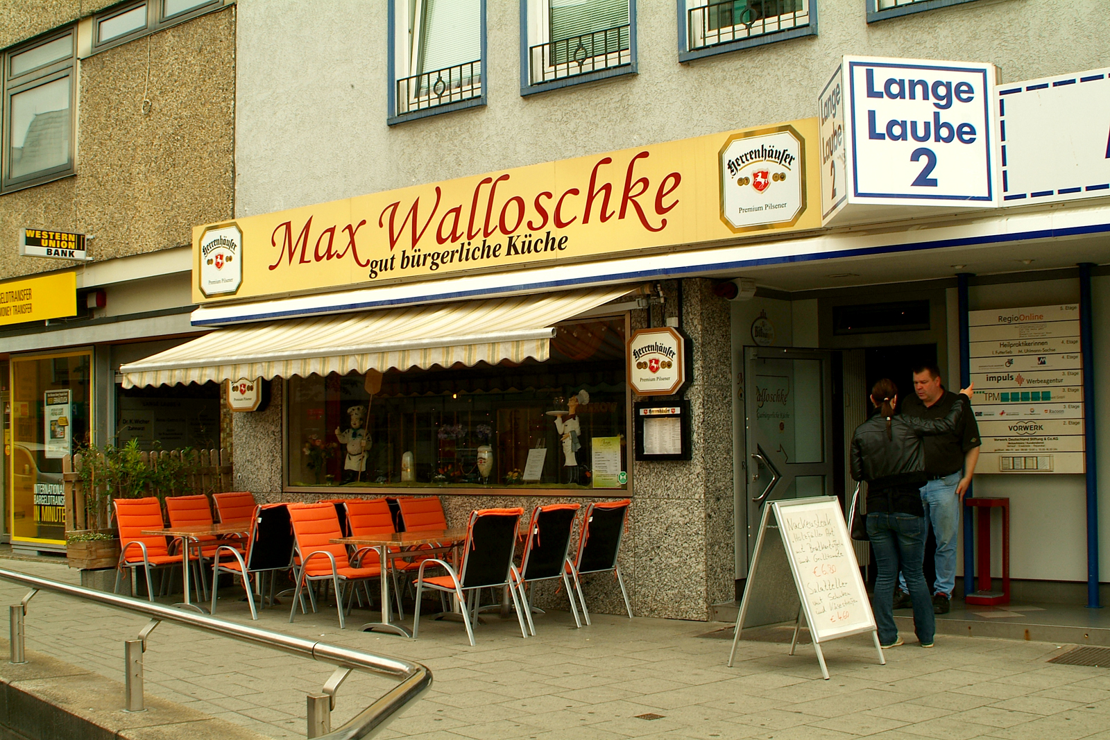 Der ehemalige Berufsringer und mehrfacher Deutscher und Europameister Max Walloschke (1889 - 1974) eröffnete sein gleichnamiges Restaurant in der Langen Laube 2 in Hannover. Das Lokal entwickelte sich rasch zu einem Prominenten-Treff.